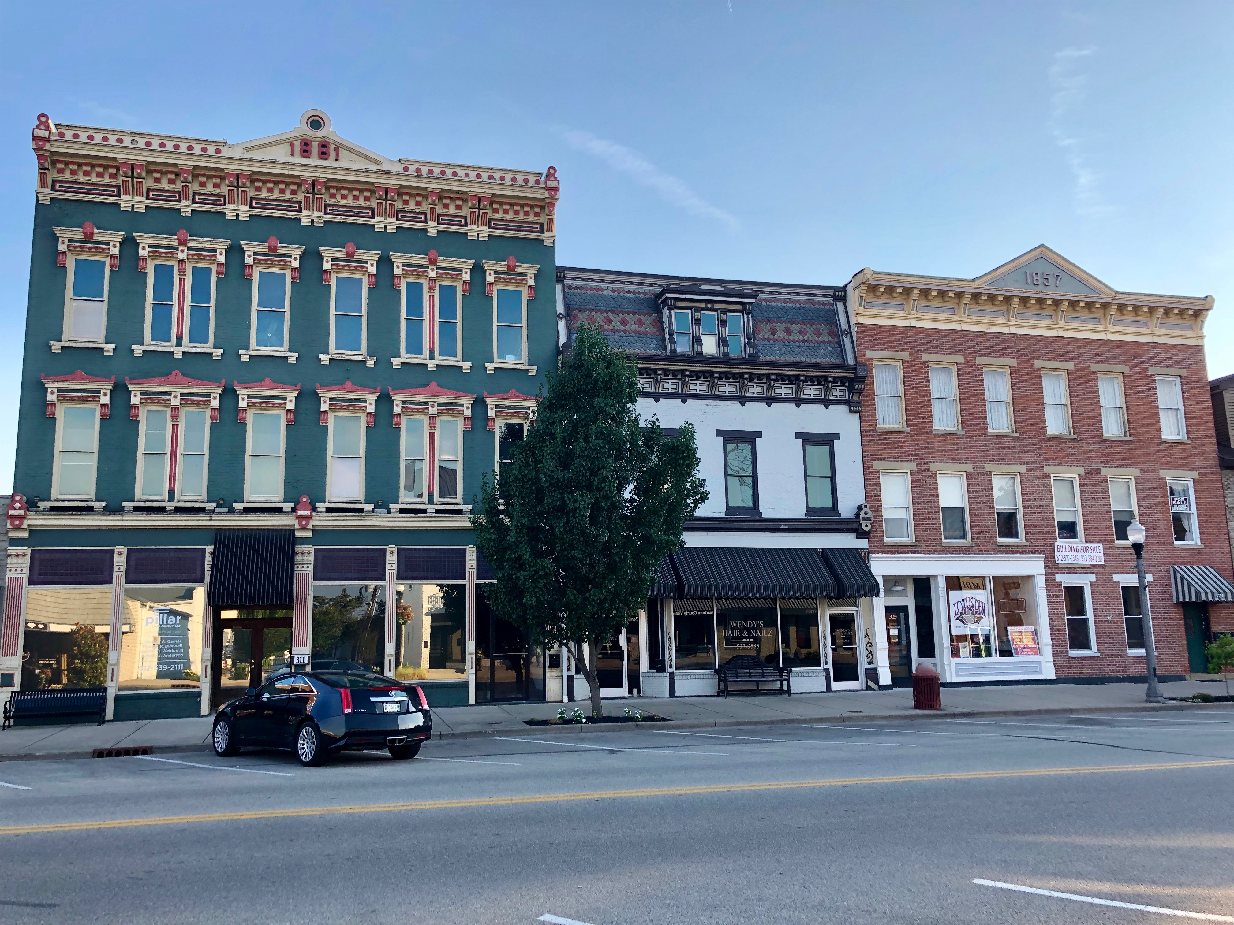 Walnut Street, Lawrenceburg, IN